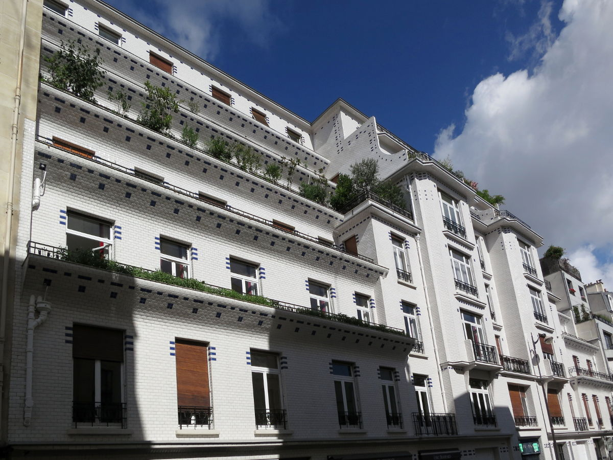 Immeuble du 26, rue Vavin, Paris VIe (architecte Henri sauvage)